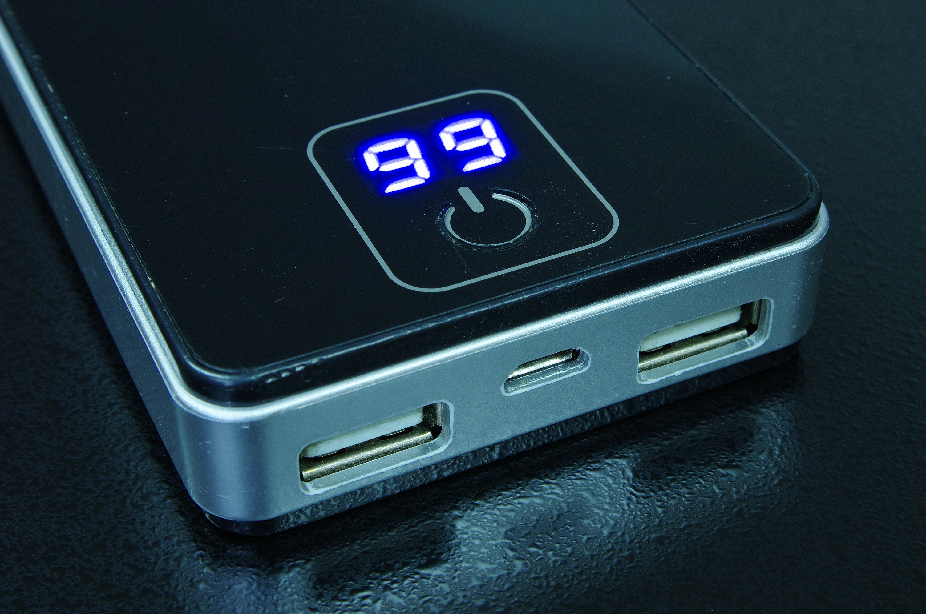 Powerbank mit zwei Ausgängen für iphone/iPad und andere Smartphones sowie Digitalanzeige für den Ladezustand